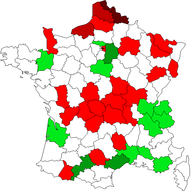 Les départements concernés par la perte ou le gain d'un ou plusieurs députés lors du redécoupage électoral de 2010 en France.